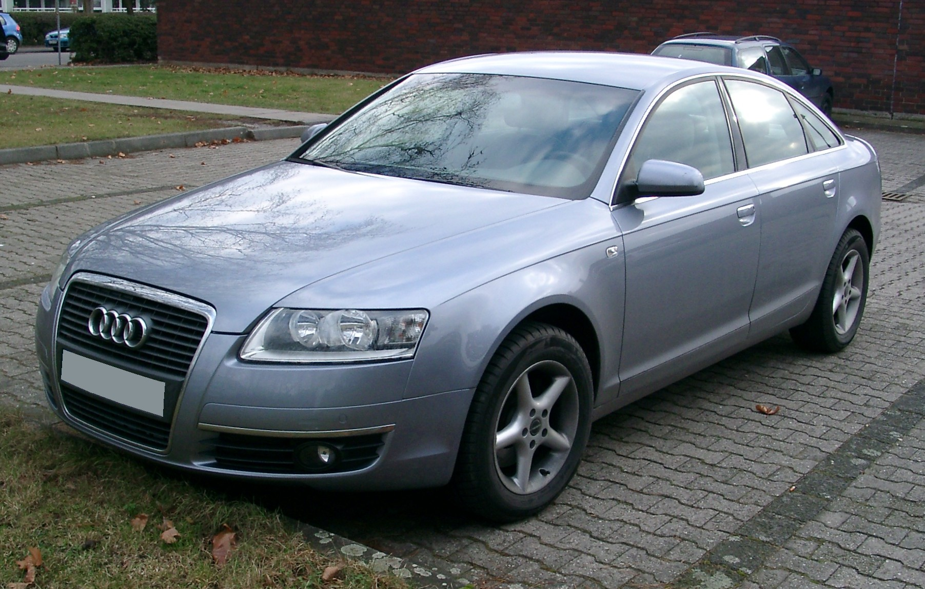 Audi A6 (C6) Limousine